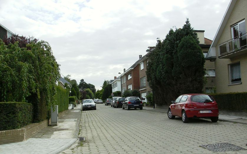 Avenue des Becassines Auderghem Belgium